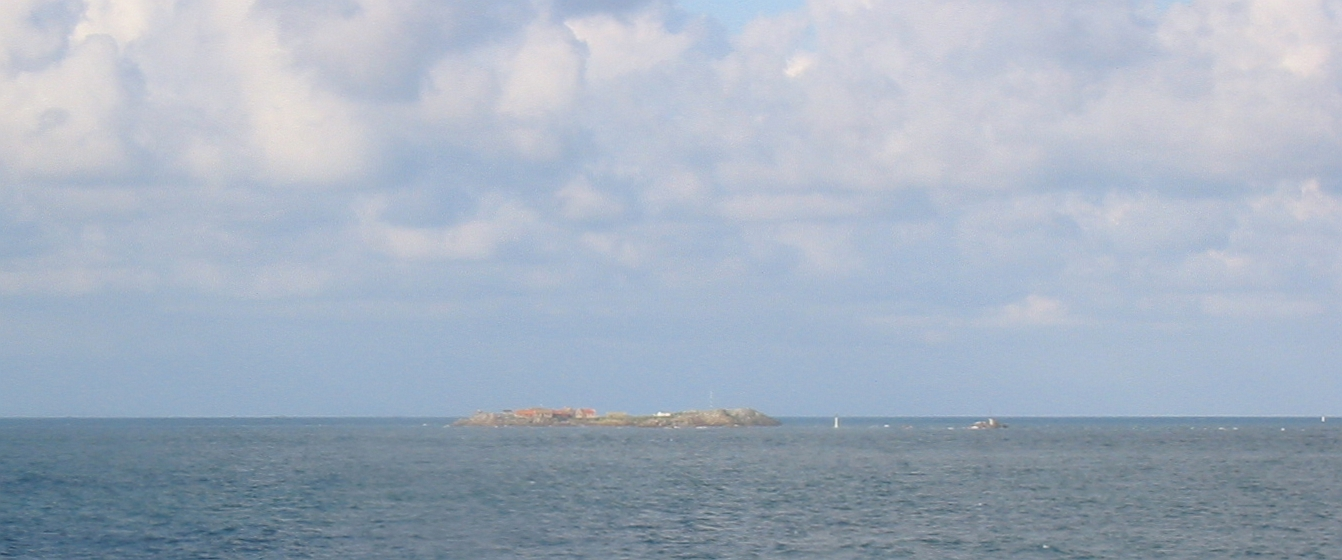 La Maîtr' Île, ès Mîntchièrs, Jèrri